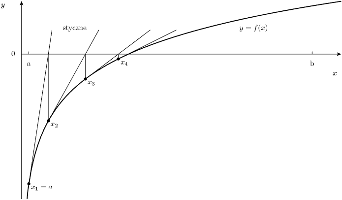 Ilustacja działania metody Newtona